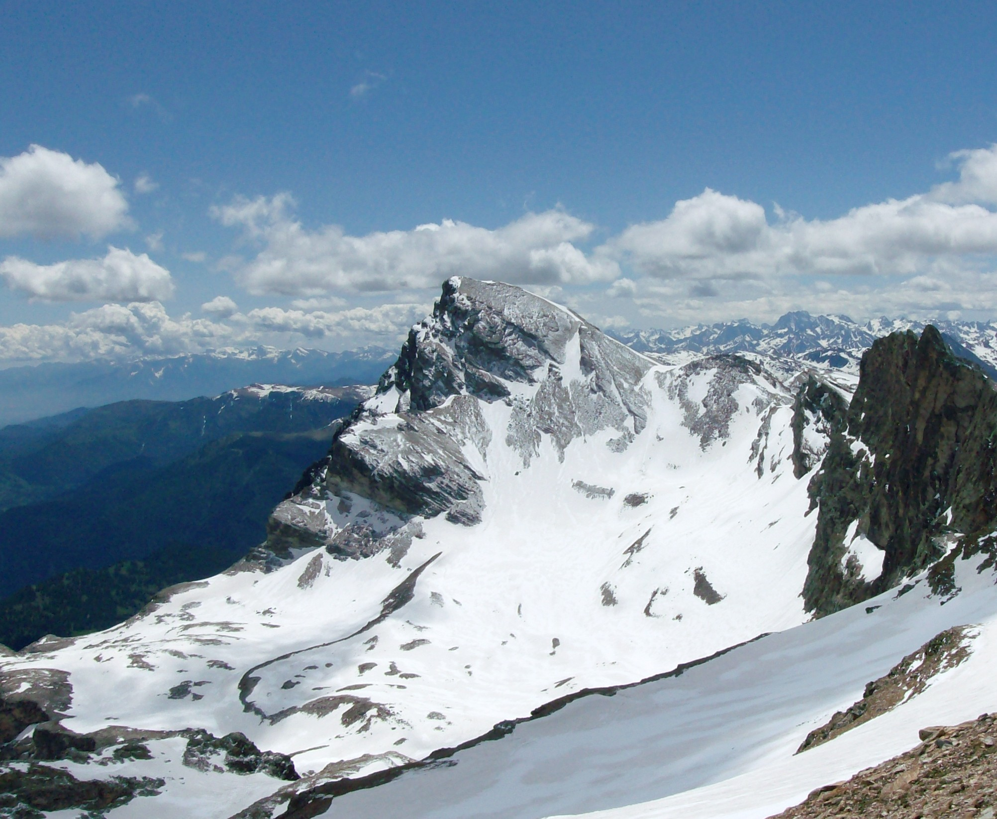 Il versante settentrionale del monte Chersogno visto dal colle delle Sagne